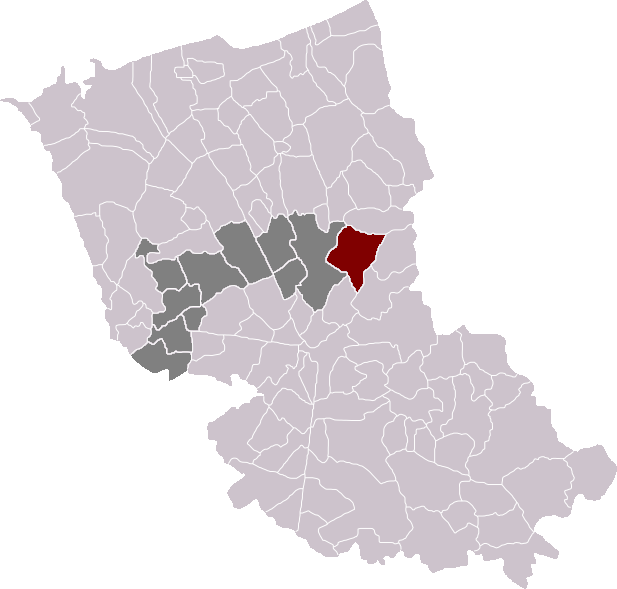 Locatie gemeente Herzele (Frans-Vlaanderen) in arrondissement Duinkerke. Zelfgemaakt. Location of Herzeele municipality in the arrondissement of Dunkirk. Self made. Localisation de la commune d'Herzeele dans l'arrondissement de Dunkerque. Fait moi-même.